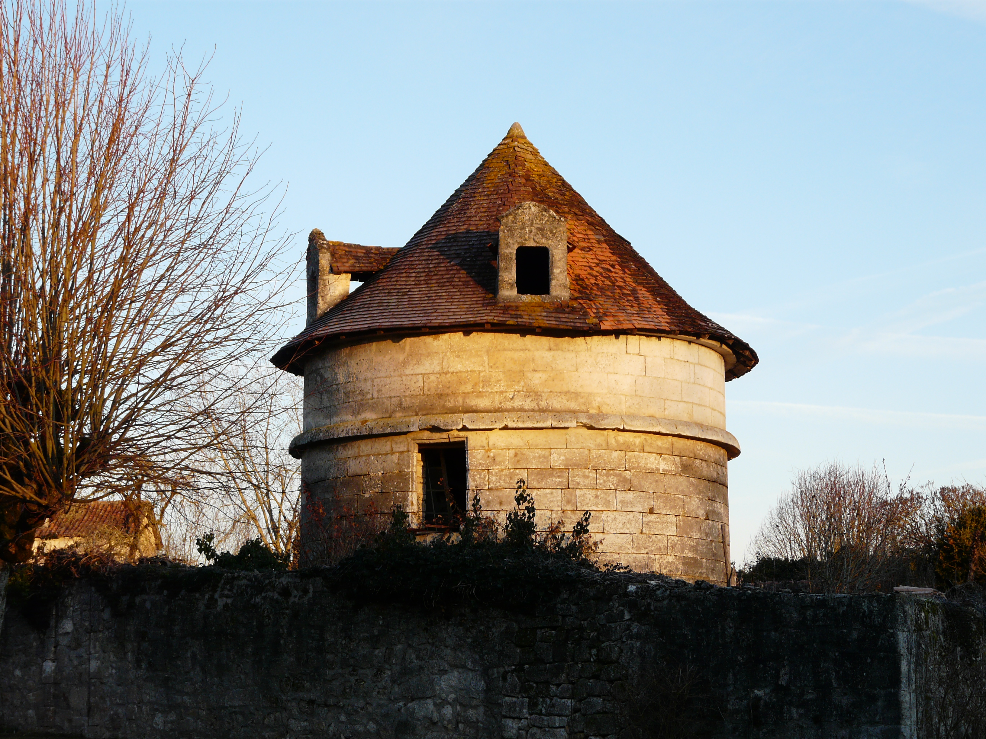 Le colombier du bourg de La Tour-Blanche, Dordogne, France.